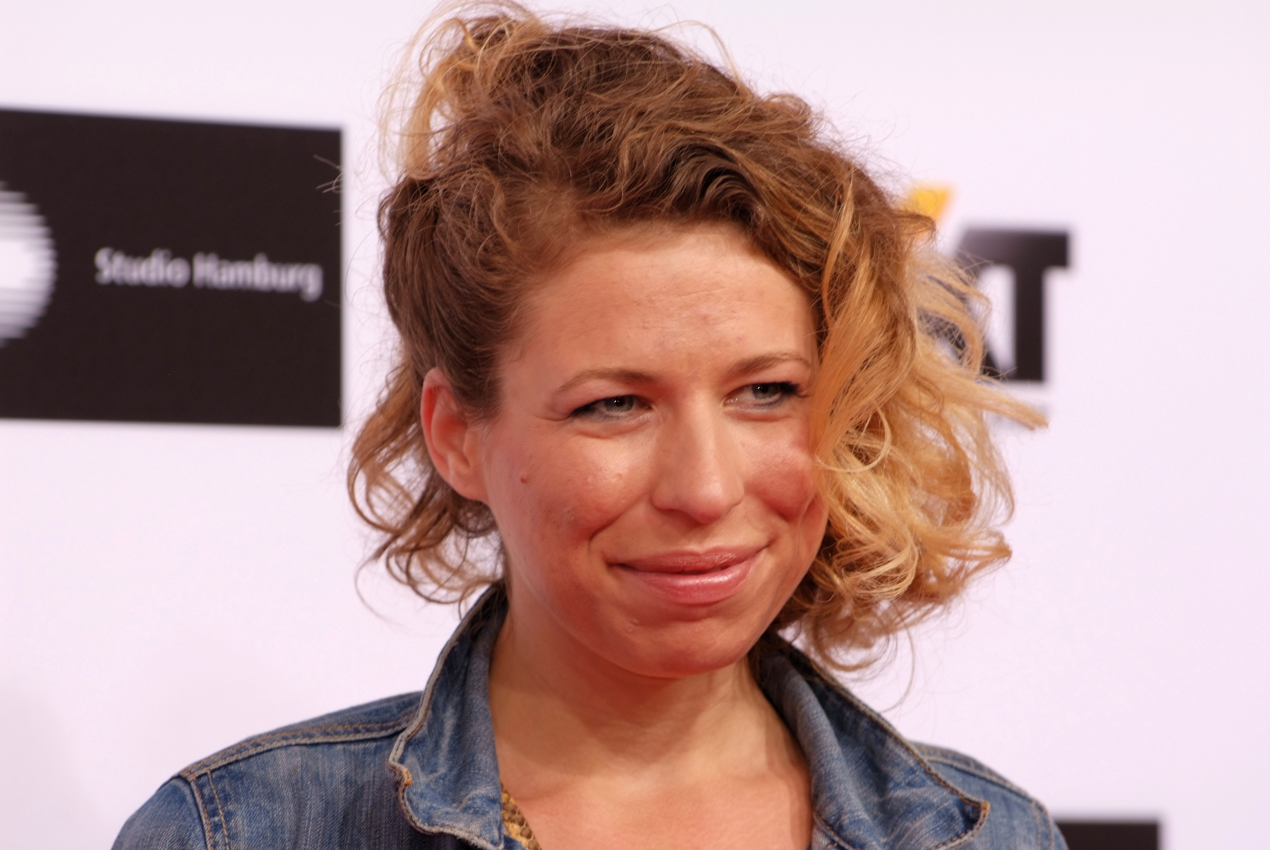 Sarah-Judith Mettke beim Studio Hamburg Nachwuchspreis 2012